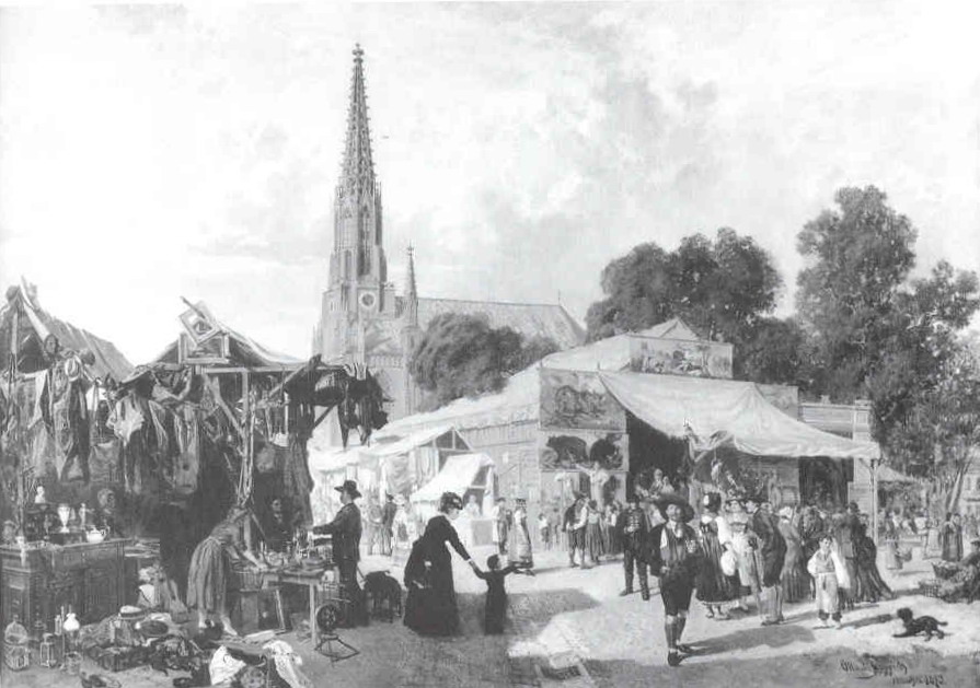 Jahrmarkt mit Wandermenagerie. Stadtmuseum München, Schaustellerstiftung